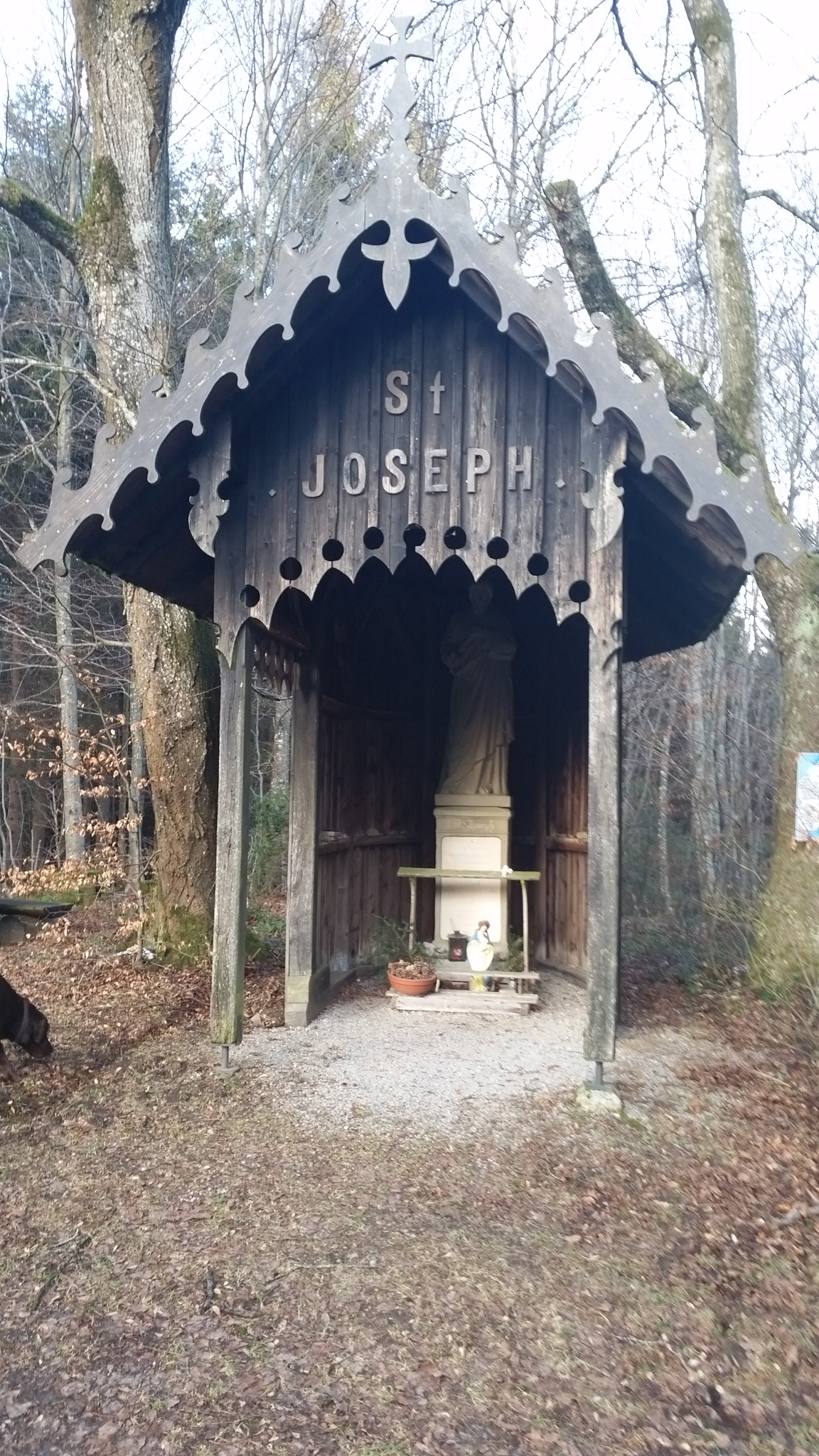 Josefskapelle